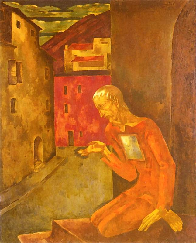 reprodukcja obrazu Eugeniusza Zaka